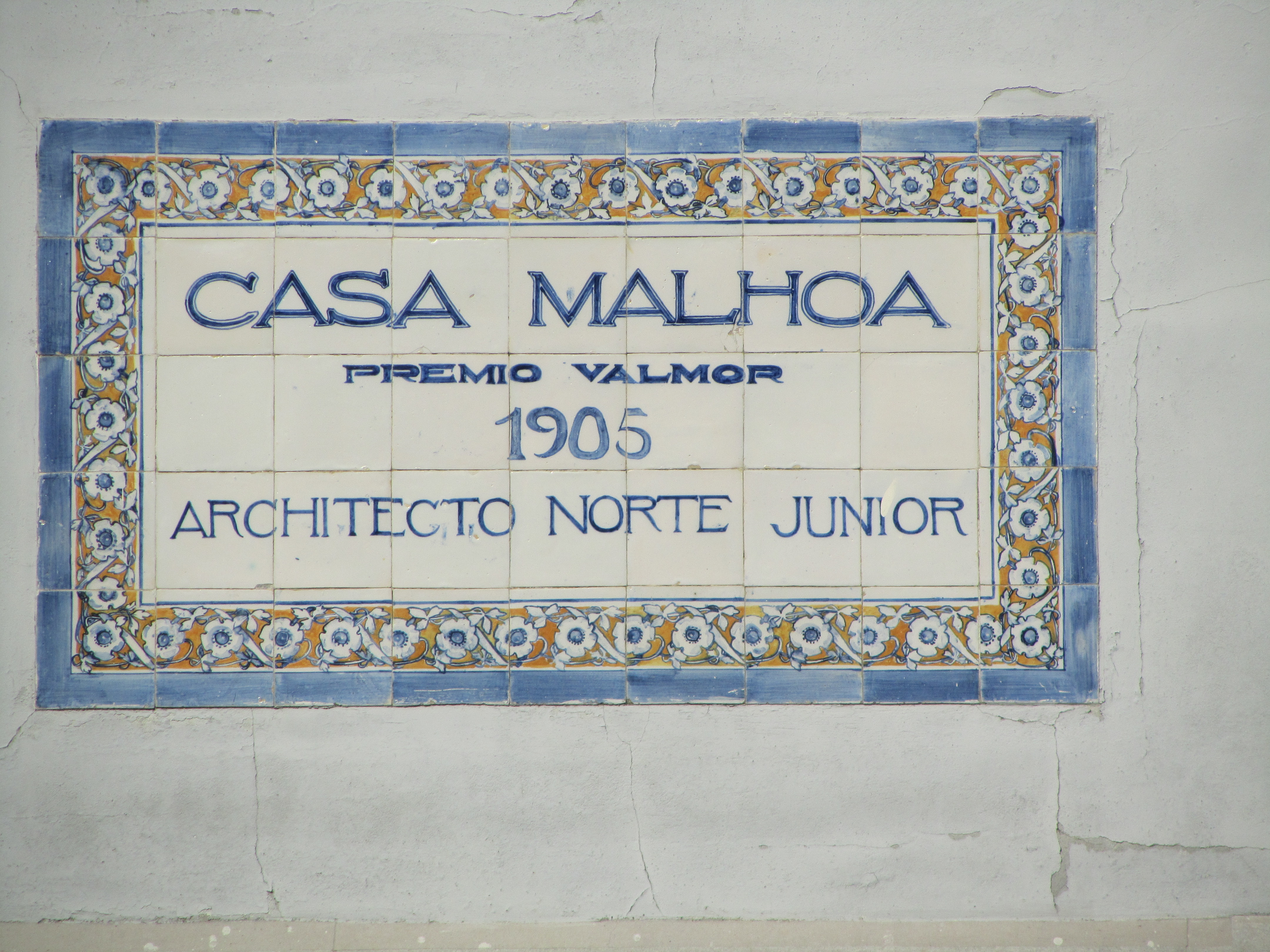 Lápide do Prémio Valmor 1905